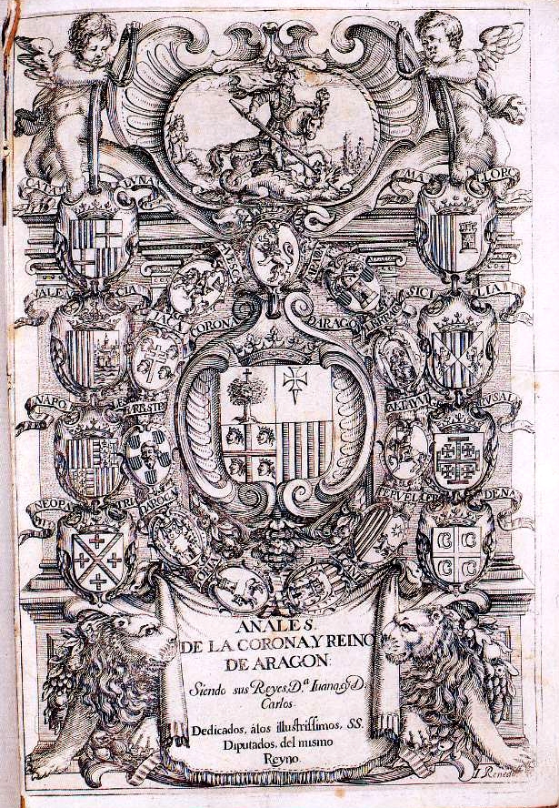 Frontispicio de los Anales de la Corona y Reino de Aragón de Juan Francisco Andrés de Uztarroz. En el centro el Escudo de Aragón, rodeado en su corona exterior por (de arriba a abajo y de izquierda a derecha) por los de Cataluña, Valencia, Nápoles, Neopatria, Mallorca, Sicilia, Jerusalén y Cerdeña; y en la Corona interior por los emblemas de (desde arriba en el centro y en sentido contrario a las agujas del reloj) Zaragoza, Huesca, Jaca, Barbastro, Daroca, Borja, Alcañiz, Teruel, Calatayud, Albarracín y Tarazona.